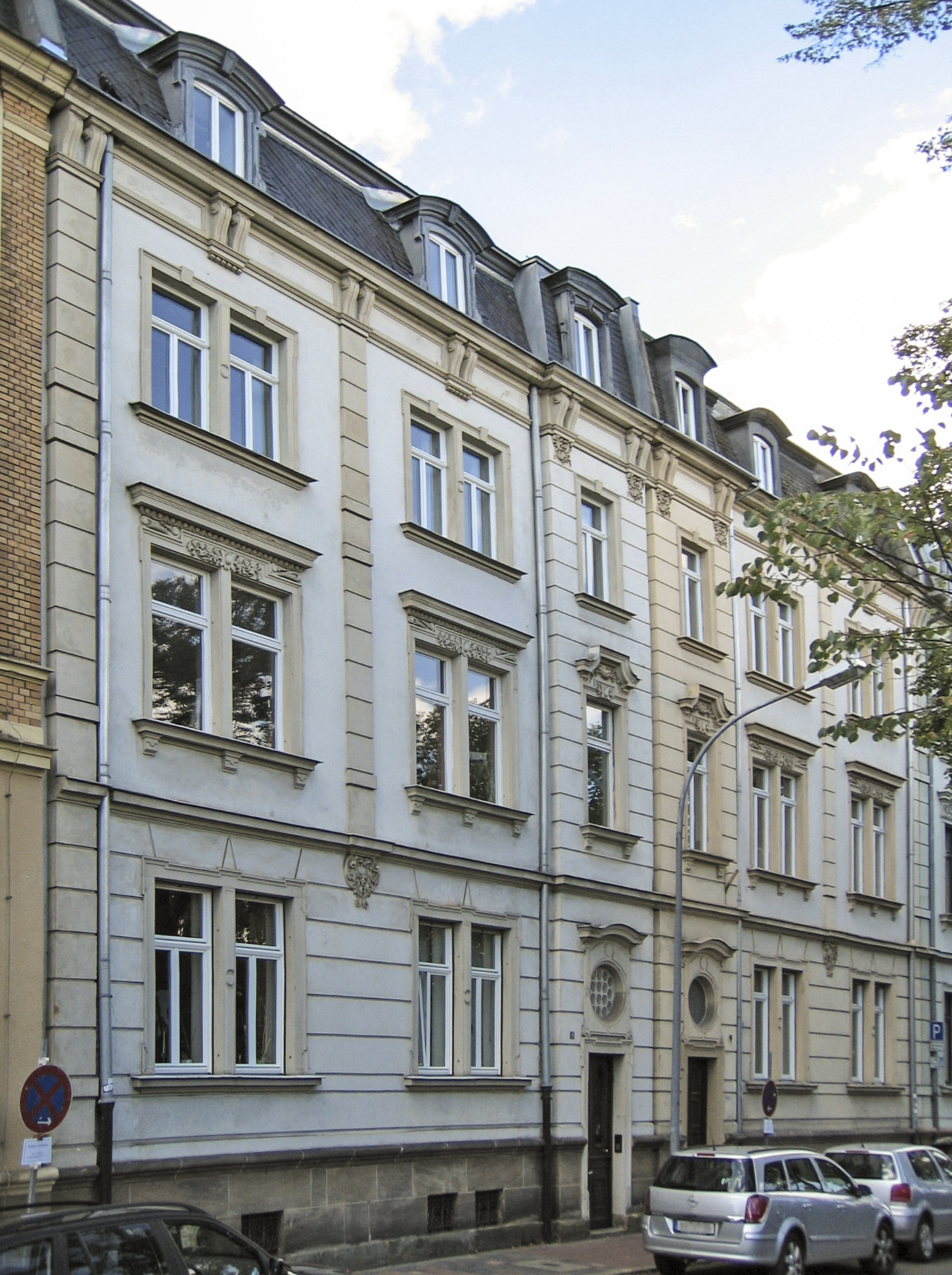 Bamberg, Heinrichsdamm 10: Jenes Haus, in dessen Dachgeschoss Michael Adams als Protagonist von Hans Wollschlägers Avantgarde-Roman Herzgewächse oder Der Fall Adams als Kind aufgewachsen ist und wohin er zu Neujahr 1950 als Schriftsteller zurückkehrt (Auch Wollschläger selbst wohnte Ende der 1950er Jahre im Haus Heinrichsdamm 10 - zuvor wohnte er in Bamberg E.T.A.-Hoffmann-Straße 2, danach Dr.-Haas-Straße 2b, Hohe-Kreuz-Straße 43 und Jacobsplatz 1).